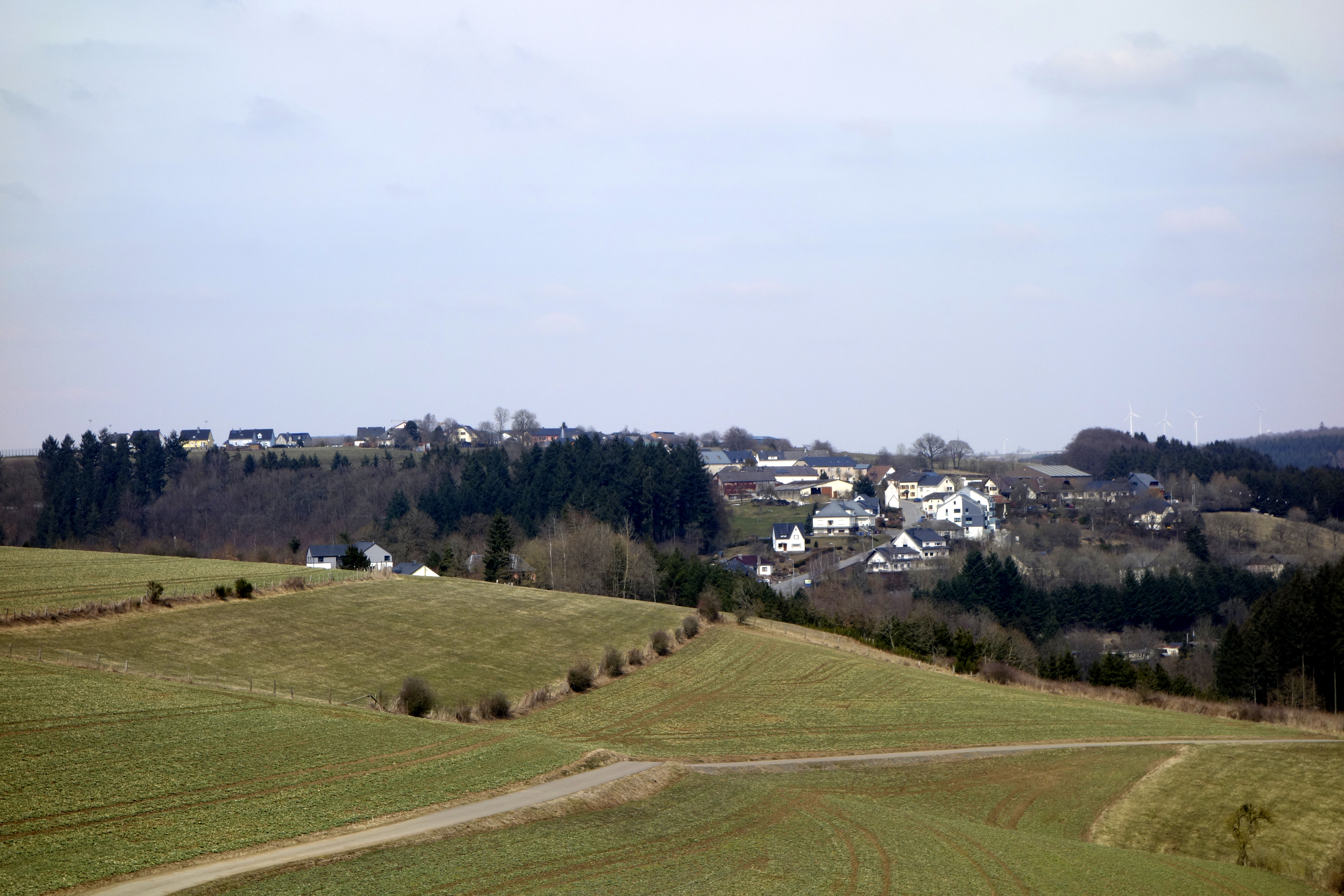 Vue sur ReulerLëtzebuergesch: Vue op Reiler